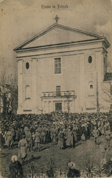 Беларуская (тарашкевіца): Полацак (Połacak), рог пляцу Рынку (plac Rynak) і вуліцы Спаскай (vulica Spaskaja). Касьцёл Маці Божай Ружанцовай і кляштар дамініканаў